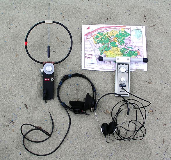 Снимка на приемник на 3,5 MHz по радиозасичане.